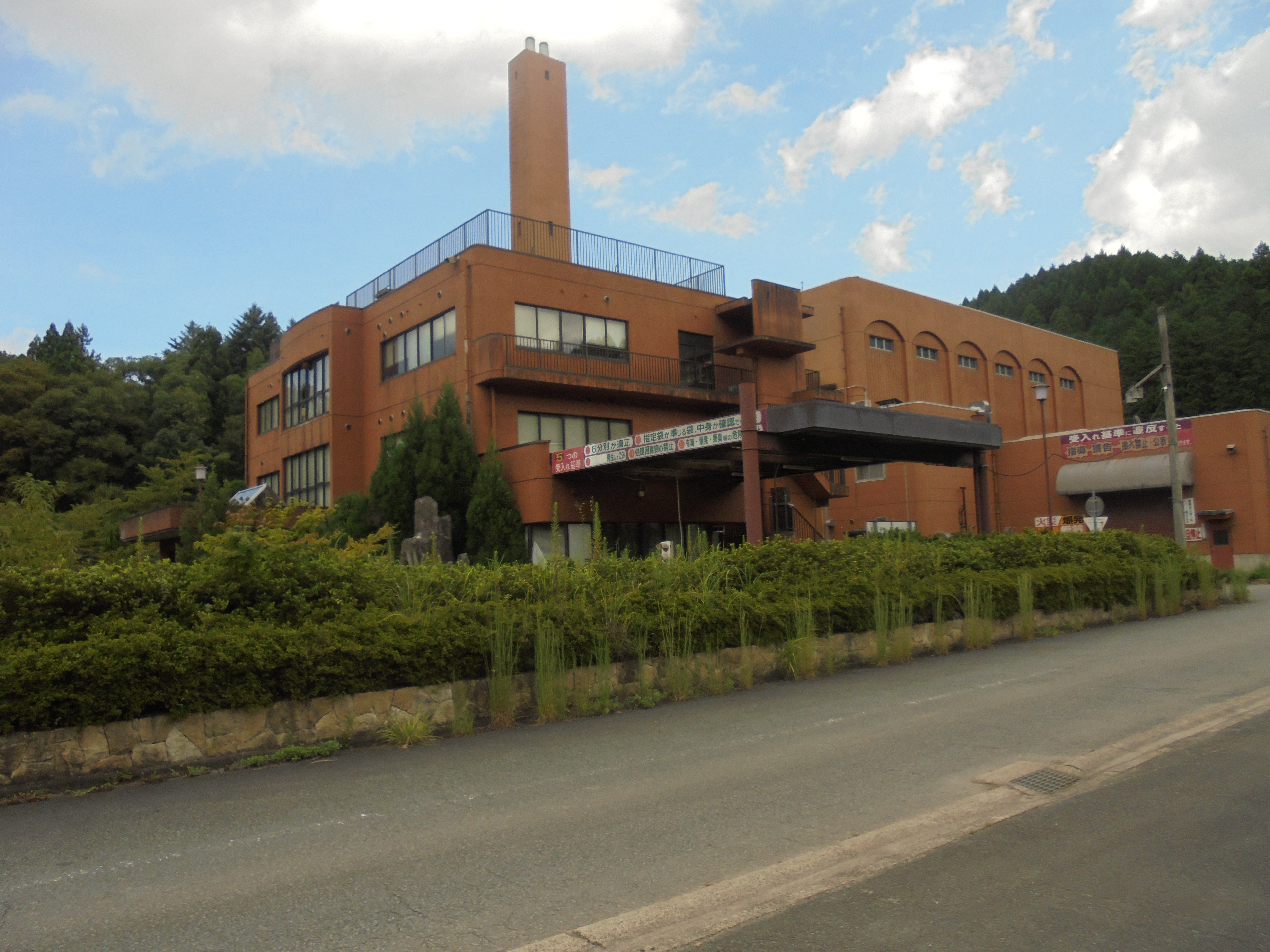 北但清掃センター 豊岡市